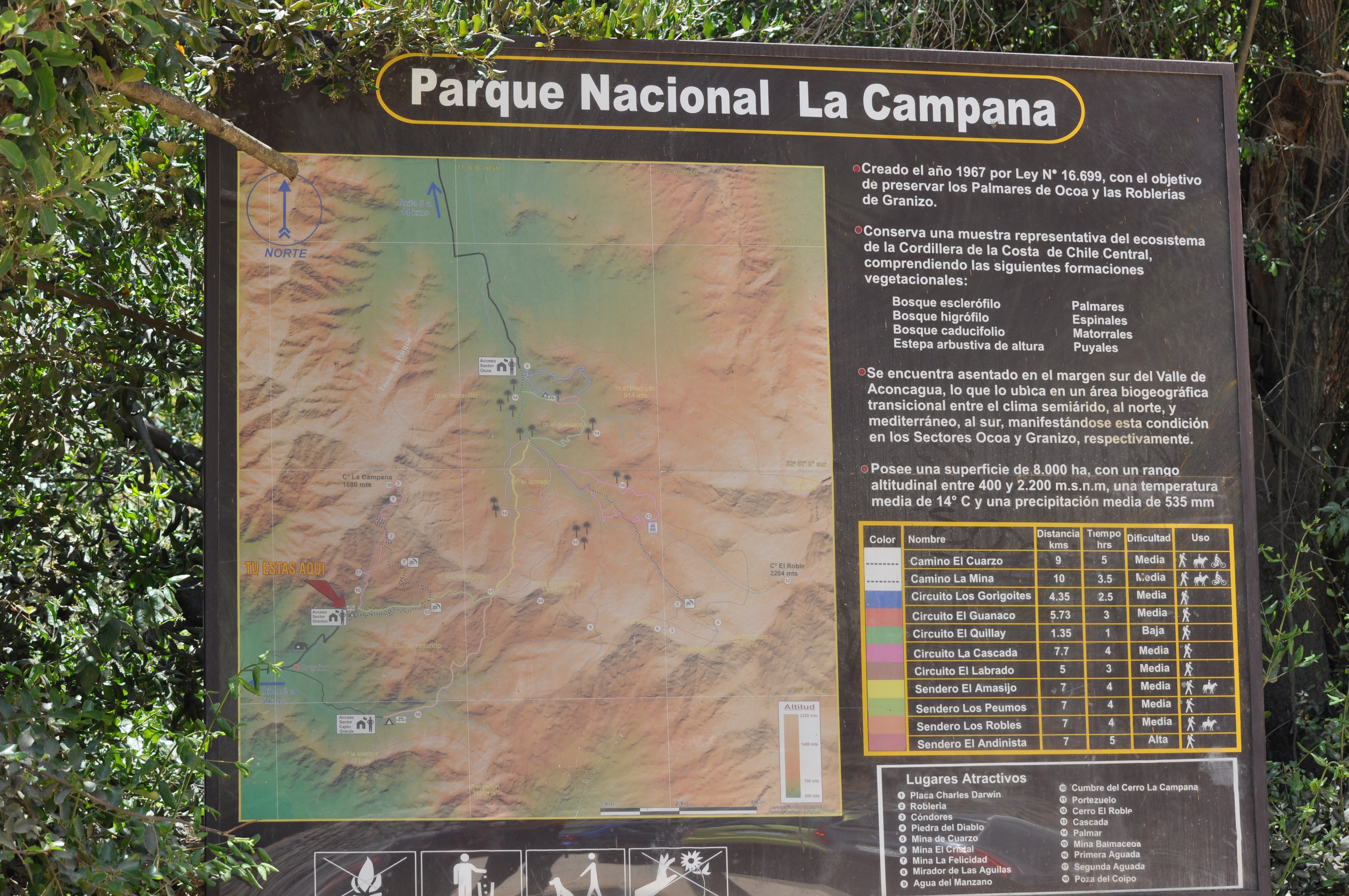 Parque Nacional La Campana. Panel informativo en el ingreso al parque por Granizo